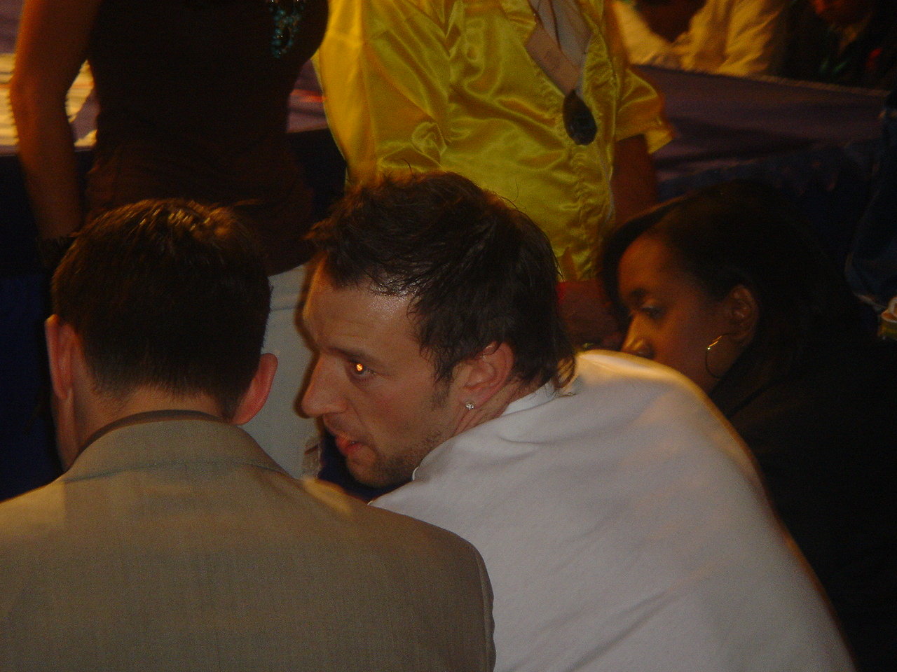 Enzo Maccarinelly